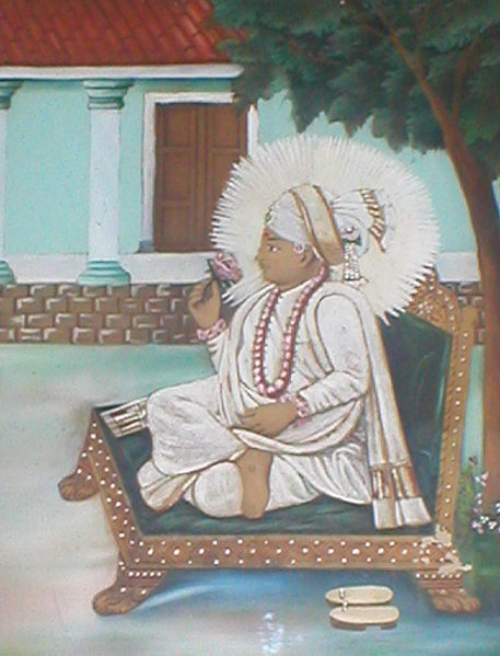 Sahjanand Swami (Swaminarayan)